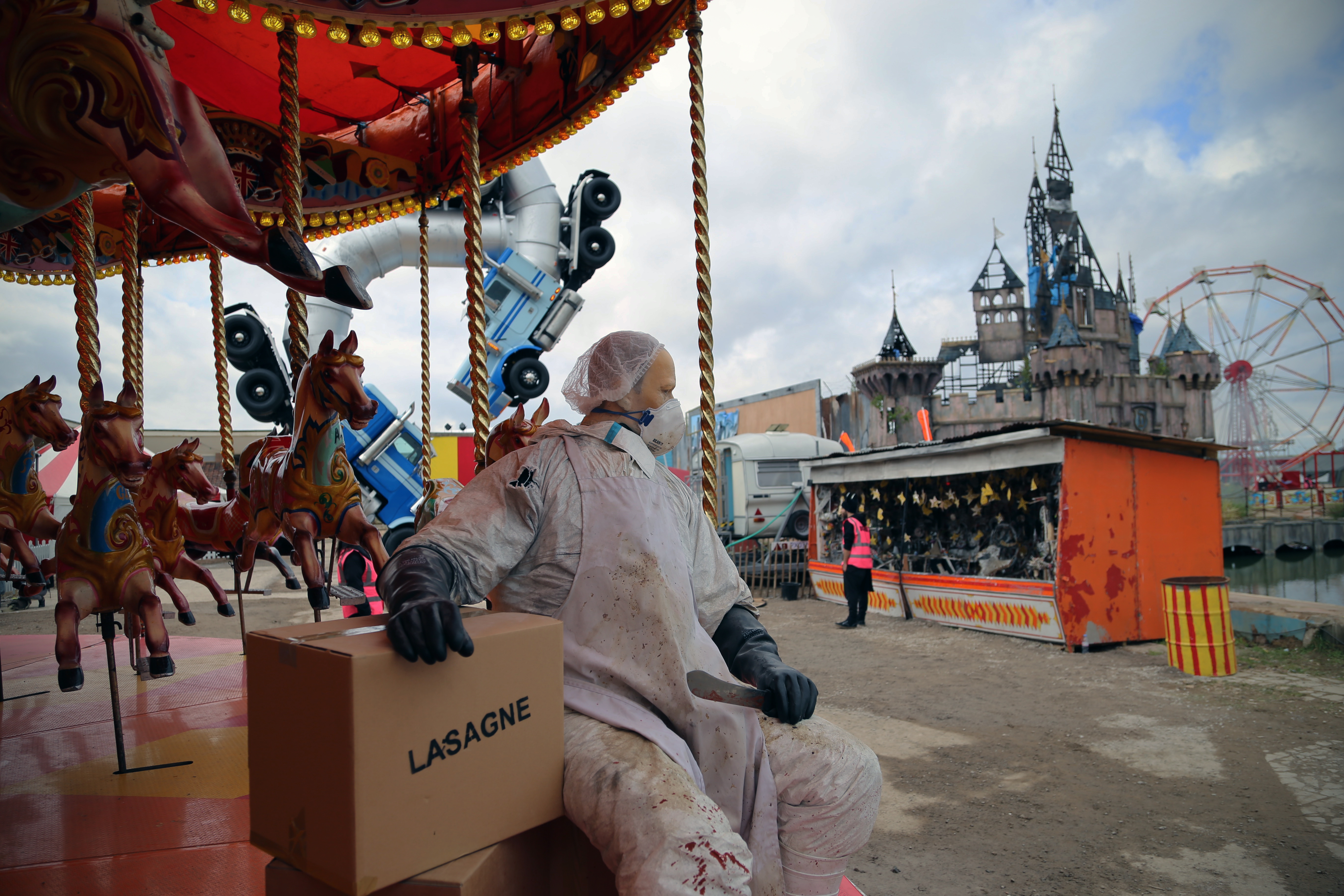 Dismaland